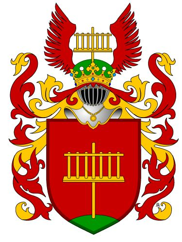 Rodový znak Bohdaneckých z Hodkova